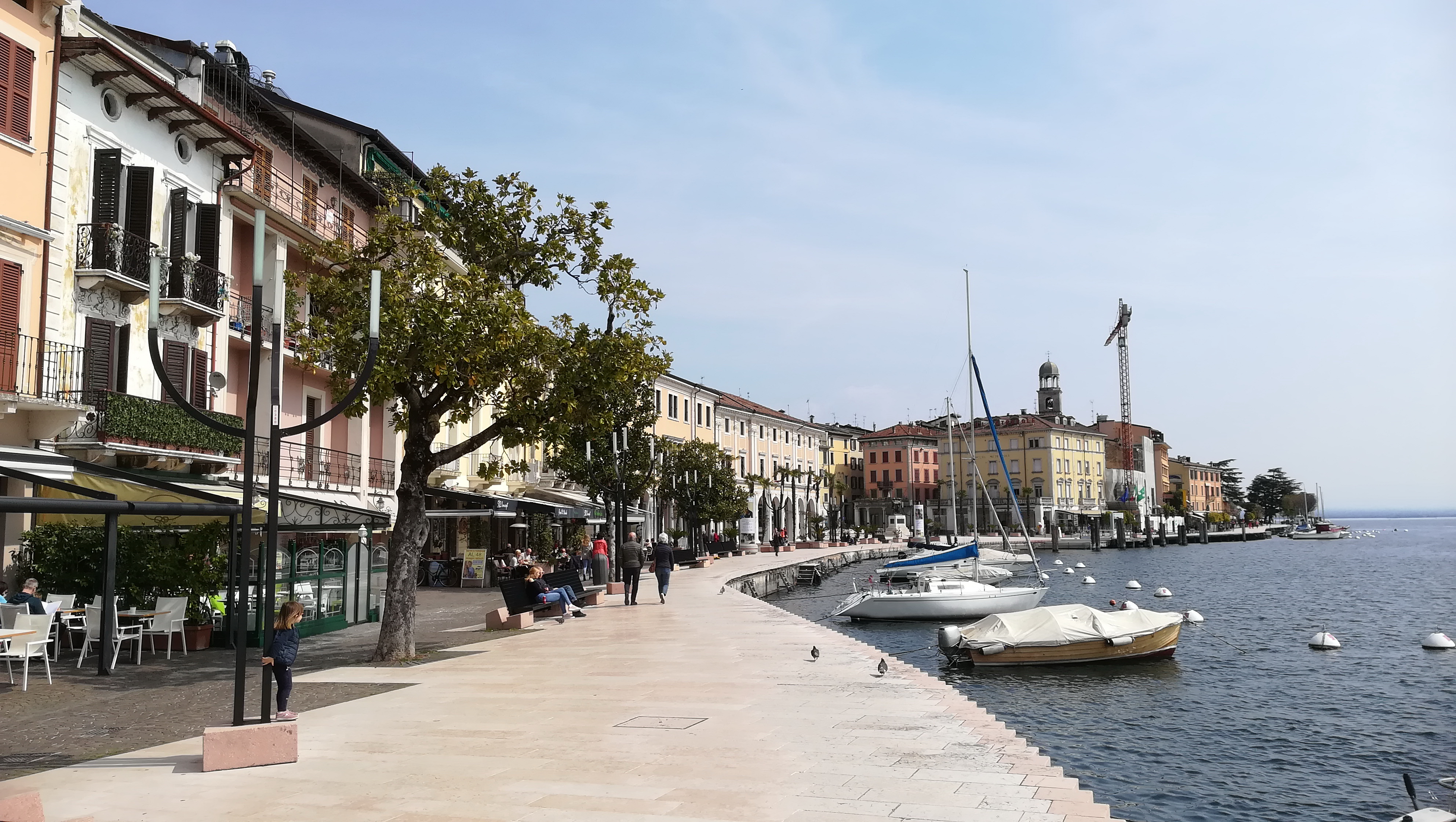 Salò ist die größte Stadt am Westufer des Gardasees.